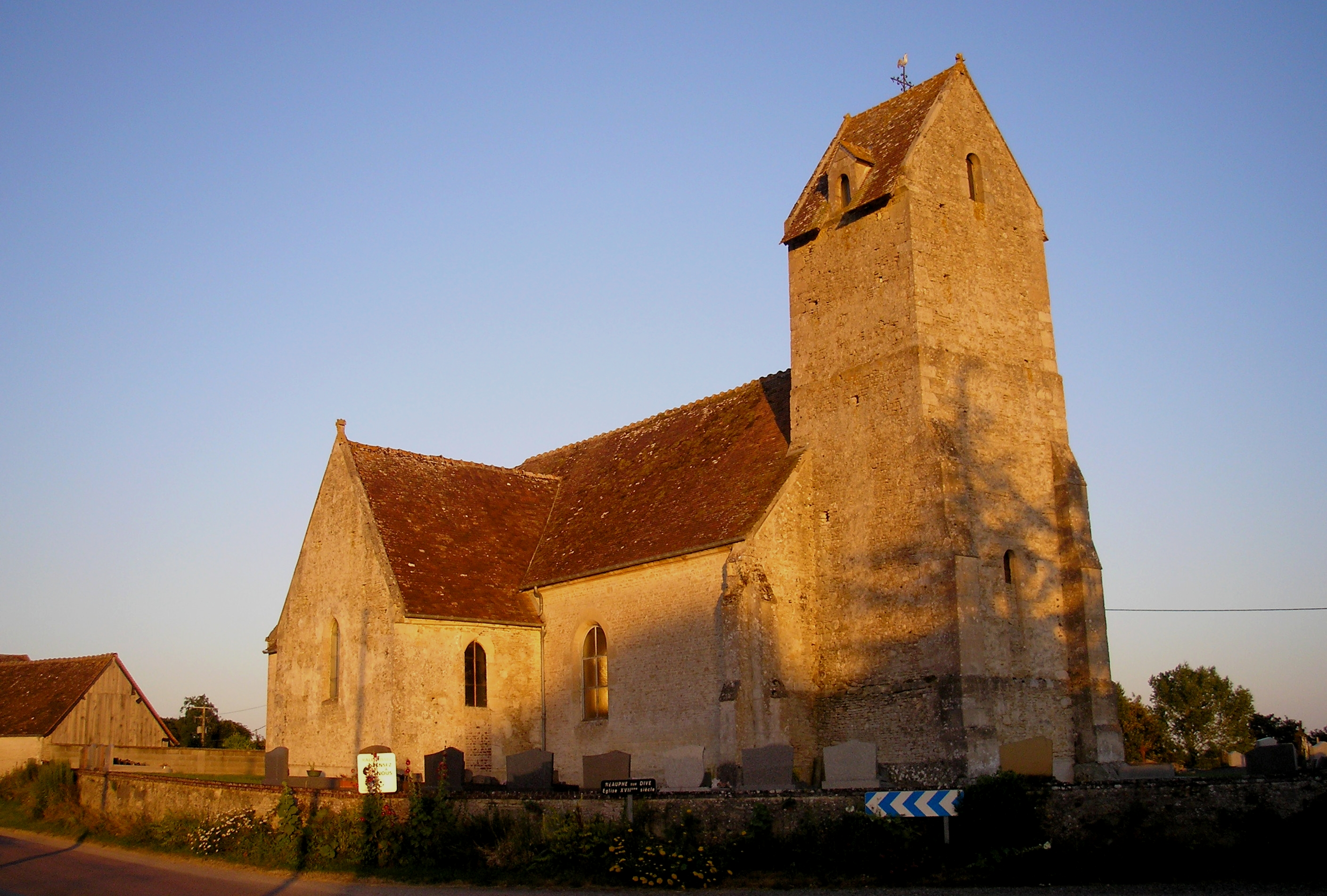 Neauphe-sur-Dive (Normandie, France). L'église Saint-Martin.